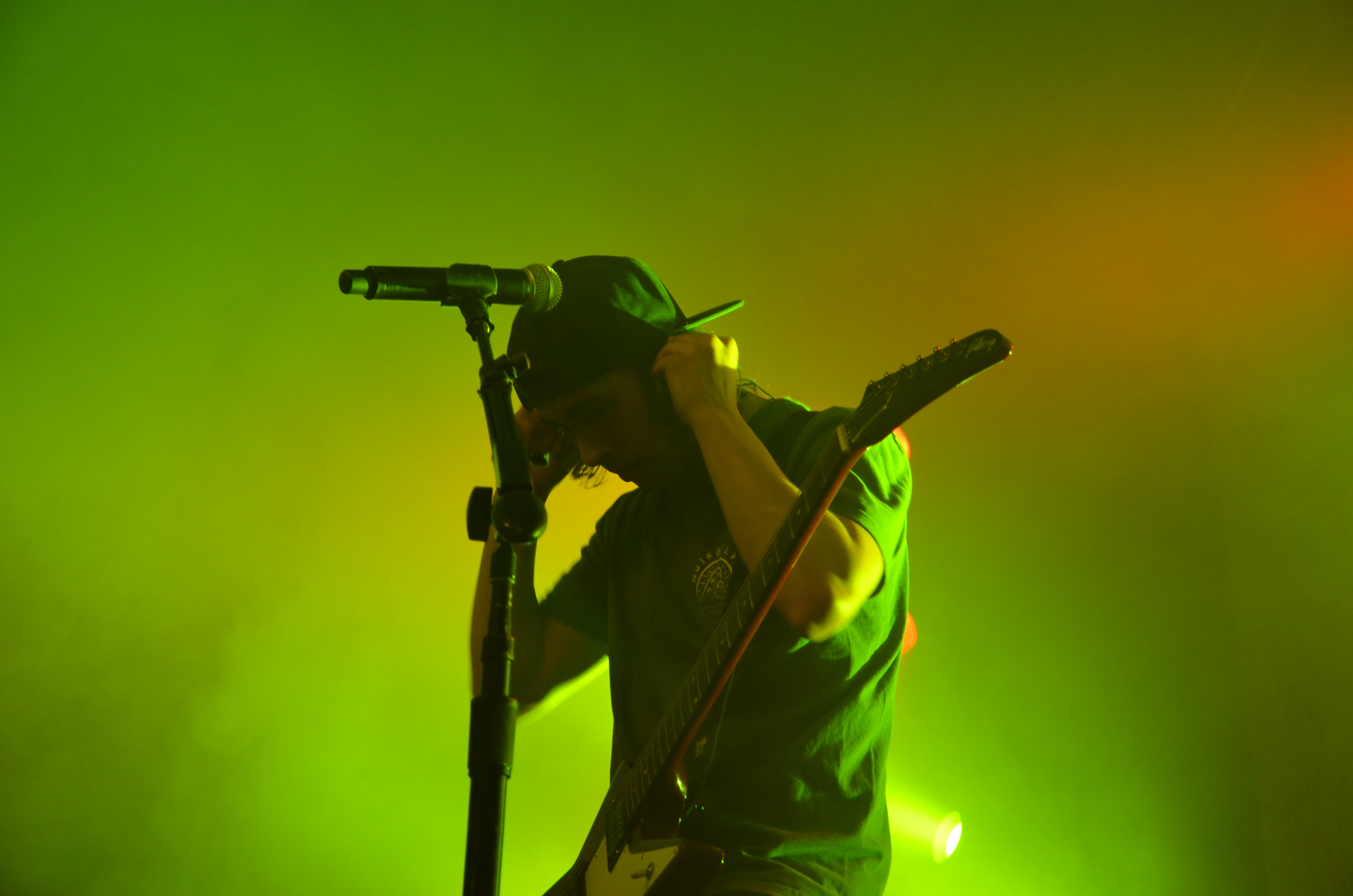 Vic Fuentes, Sänger von Pierce the Veil, in der Live Music Hall in Köln, 2016.